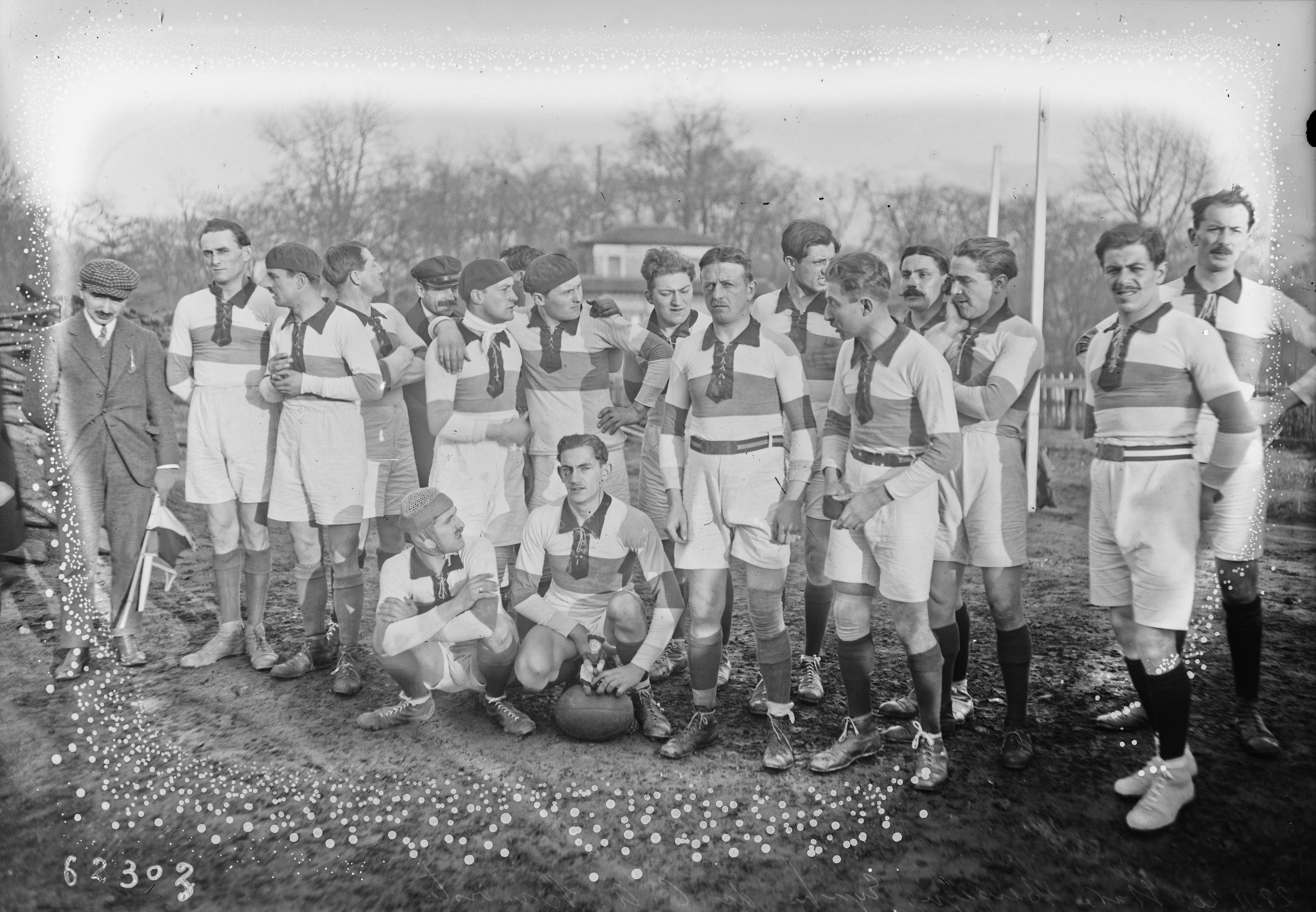 28-11-20, rugby, stade Bergeyre, équipe du C.A. Briviste.